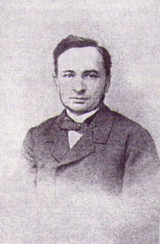 Казімір (Казімеж) Кшывіцкі (1820—1883) — кансерватыўны палітык, аўтар школьнай рэформы ў Царстве Польскім.